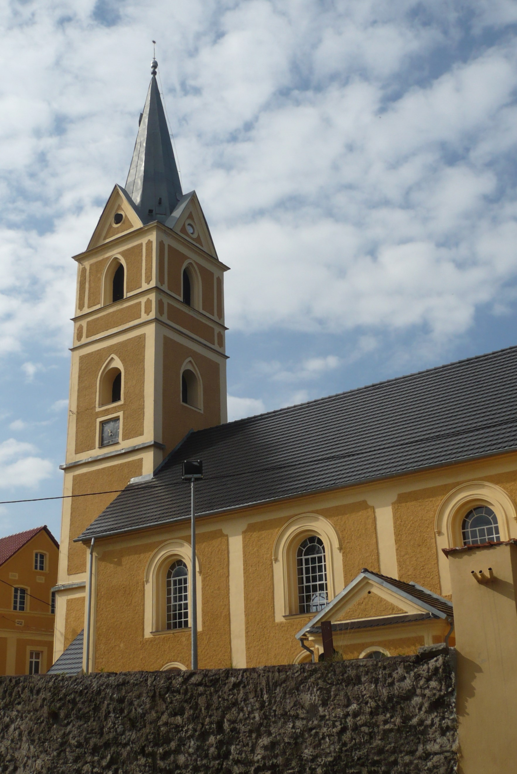 Kościół w Piszkowicach